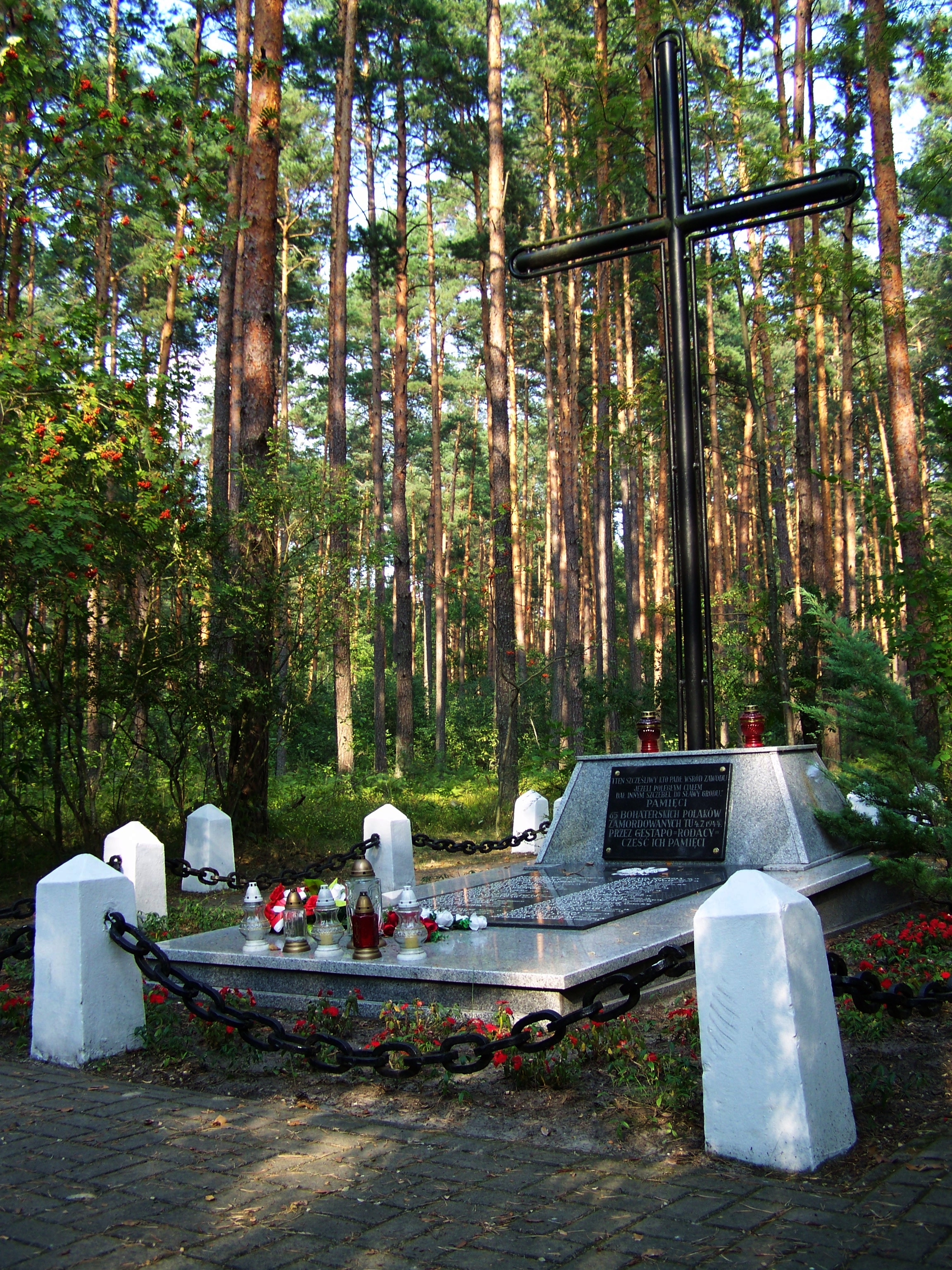 Miejsce egzekucji partyzantów, jeńców bitwy pod Osuchami, zamordowanych na Rapach przez hitlerowców w 1944 roku.